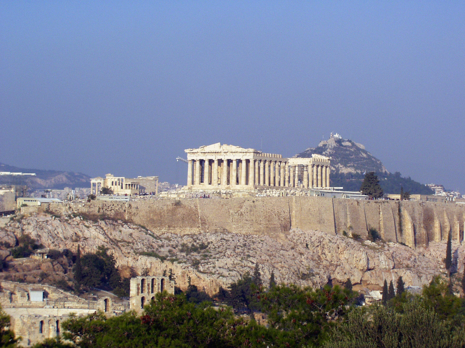 Foto gemaakt op de berg tegenover de Acropolis.